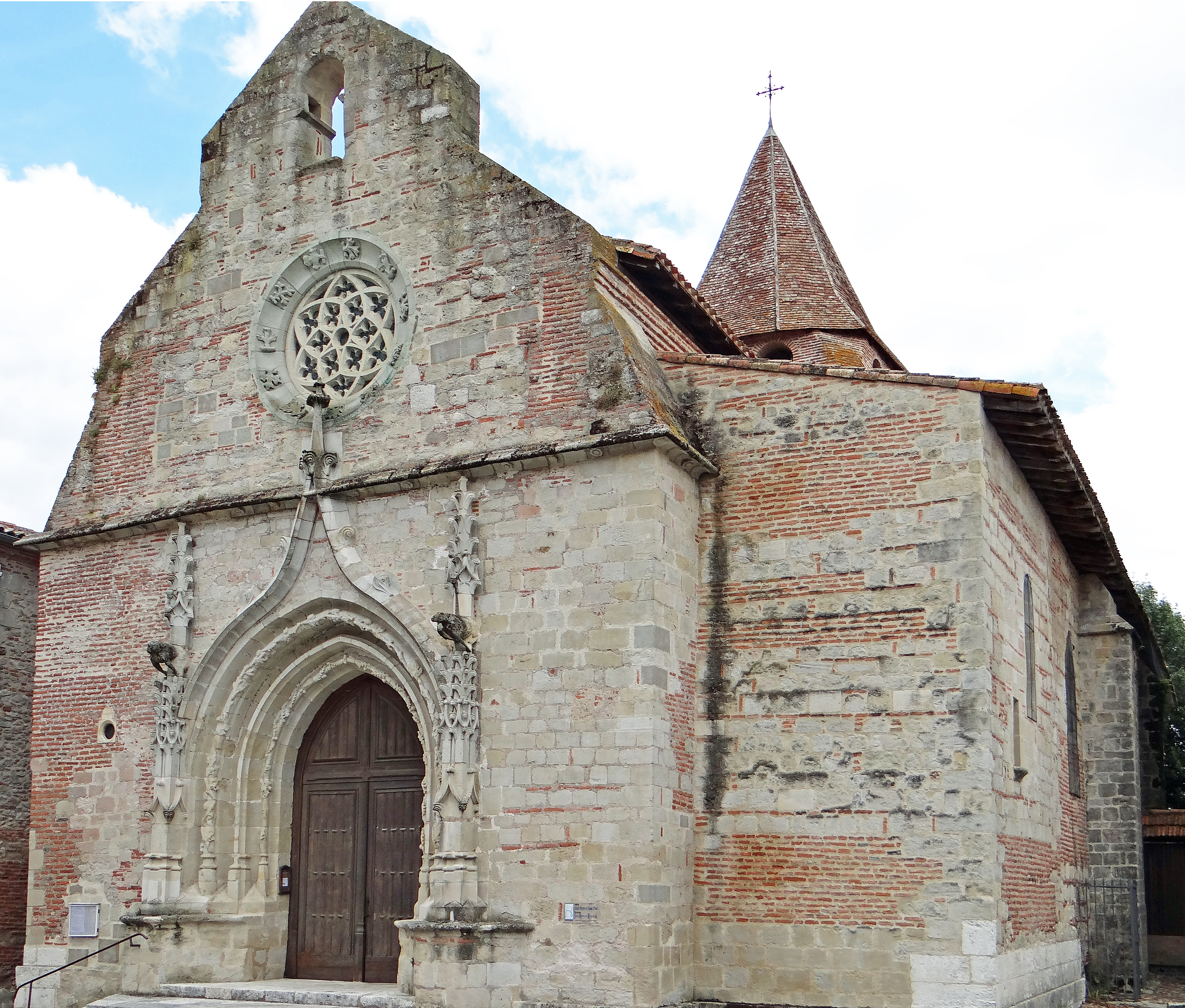 Casseneuil - Église Saint-Pierre